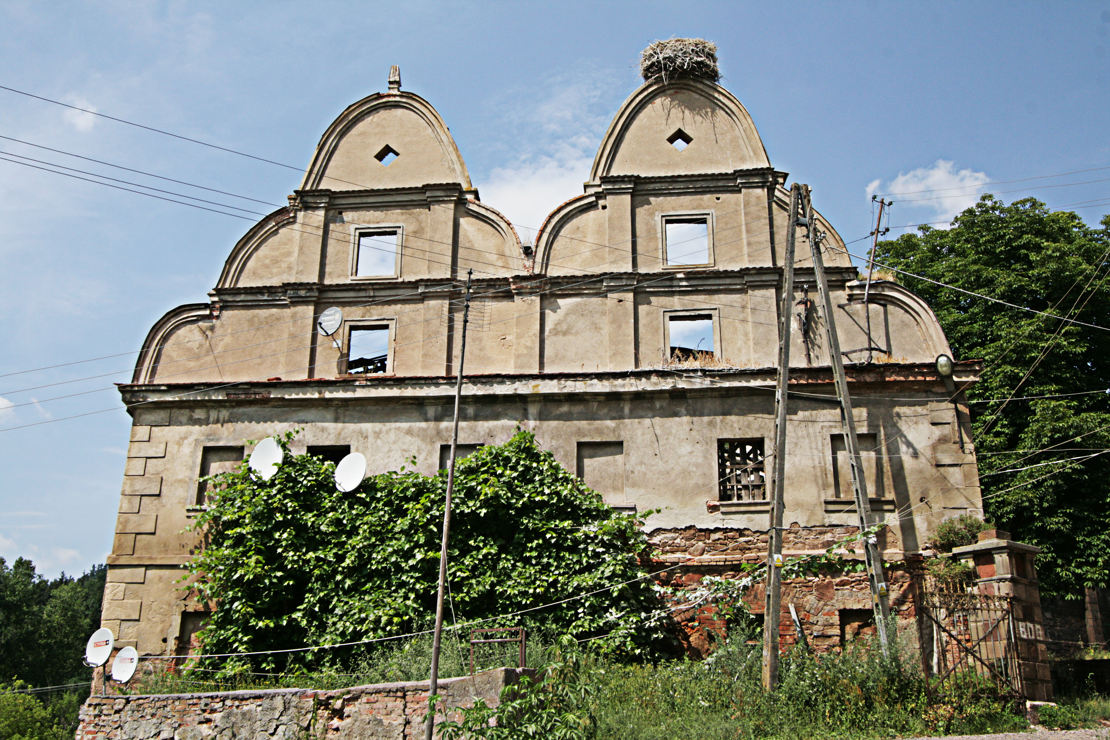 Ścinawka Górna, spichrz, 2 poł. XVII